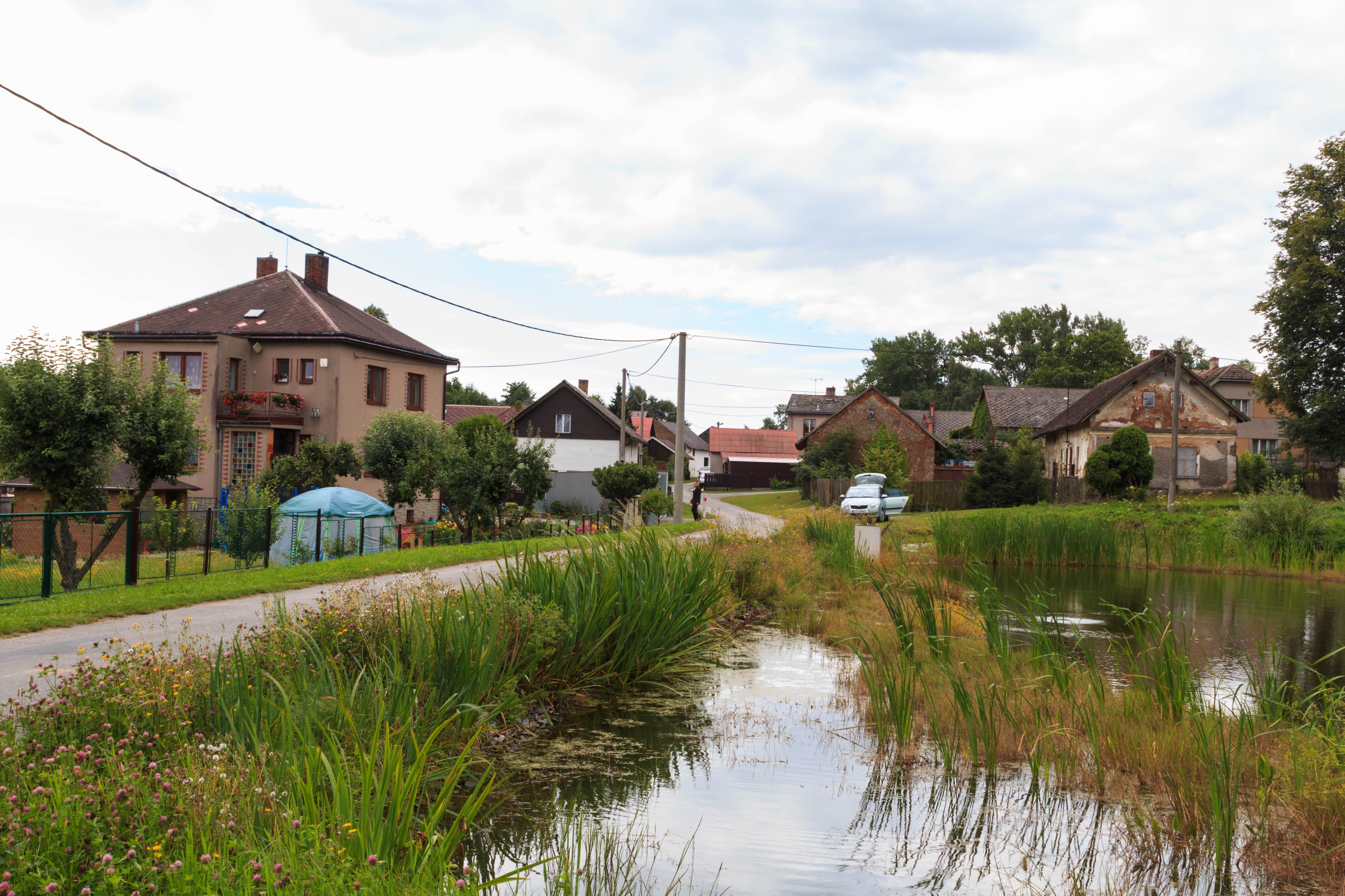 Sedletín čp. 55